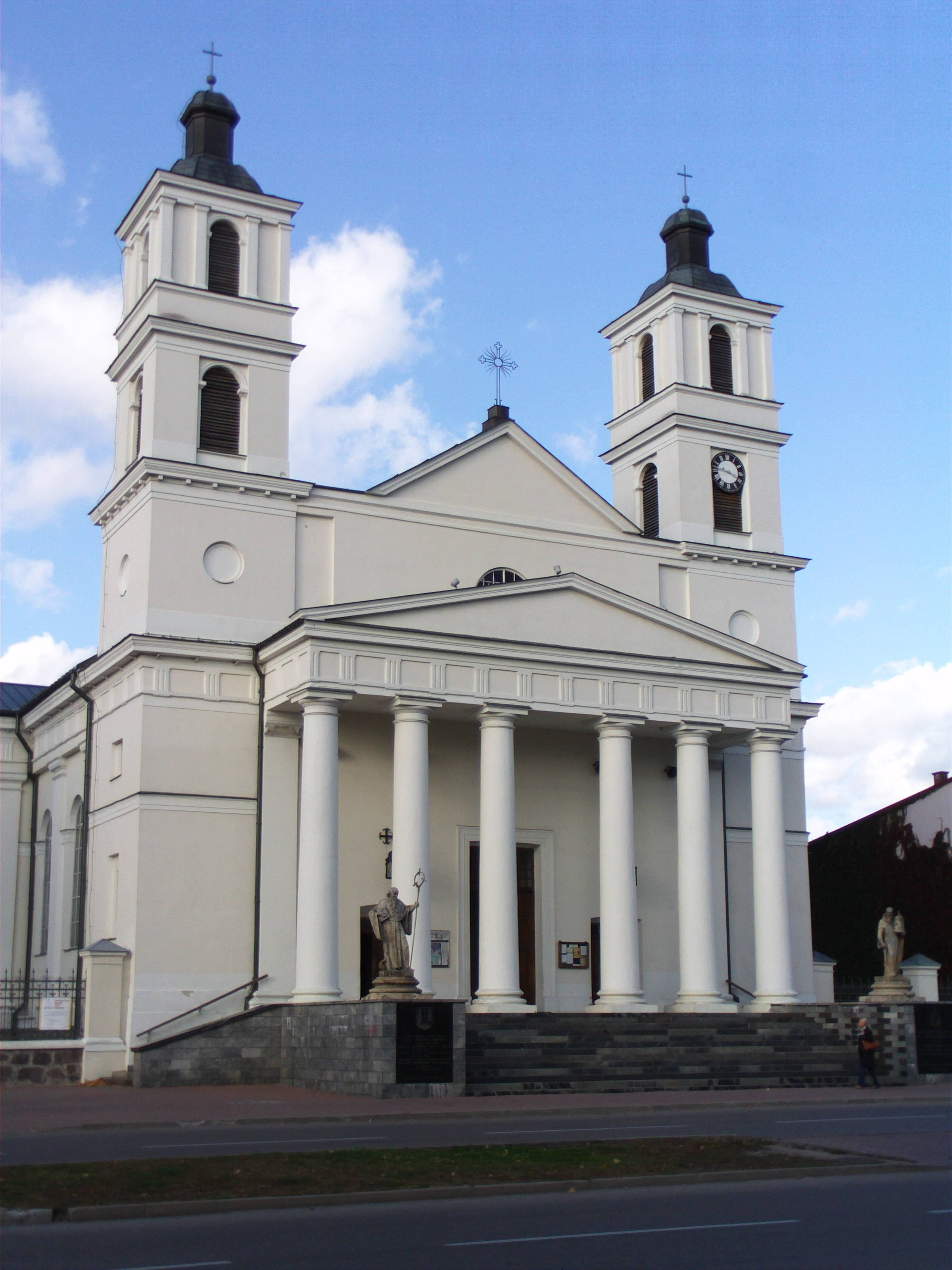 Kościół par. p.w. św. Aleksandra w Suwałkach